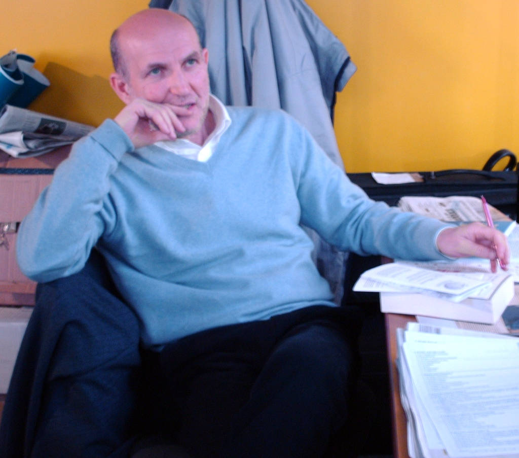 Marino Sinibaldi in his programme "Fahrenheit" area at Galassia Gutenberg 2008